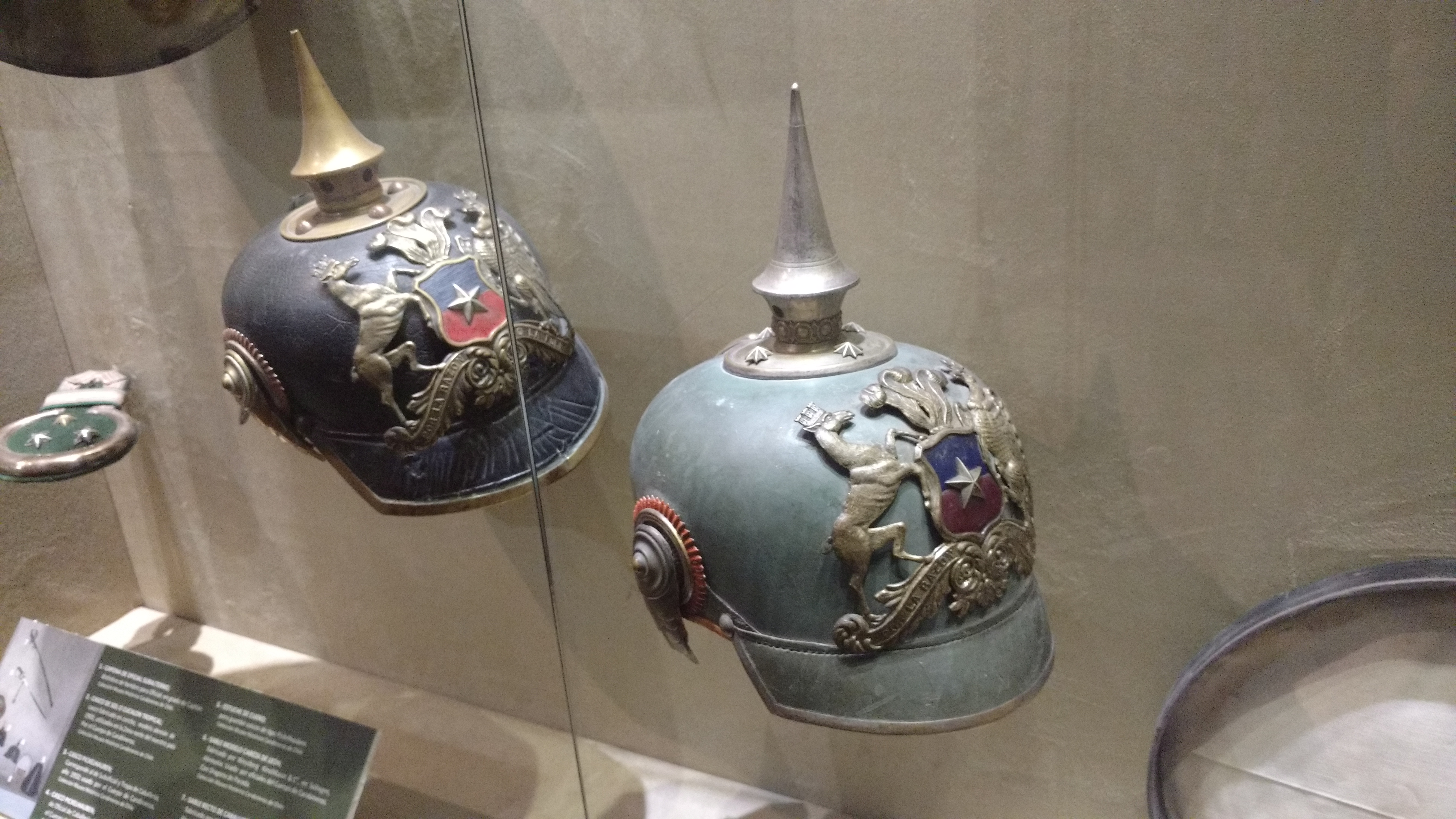 El casco prusiano es usado en el Ejército de Chile y es uno de los legados de la tradición prusiana en este ejército.